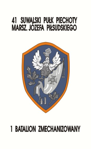 plakat kultywowania przez 1 batalion 29 Brygady Zmechanizowanej tradycji 42 suwalskiego pułku piechoty